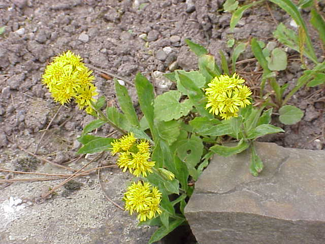 Species: Solidago virgaurea minuta Family: Asteraceae Image No. 2